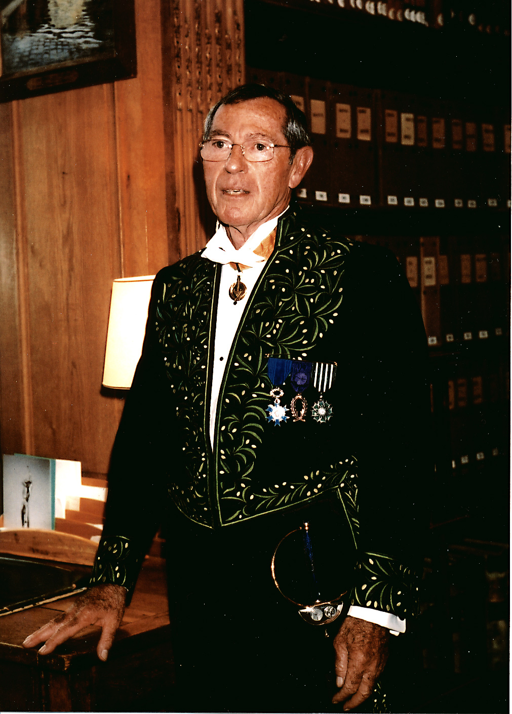 Serge Lancel le jour de sa réception à l'Académie des Inscriptions et Belles Lettres